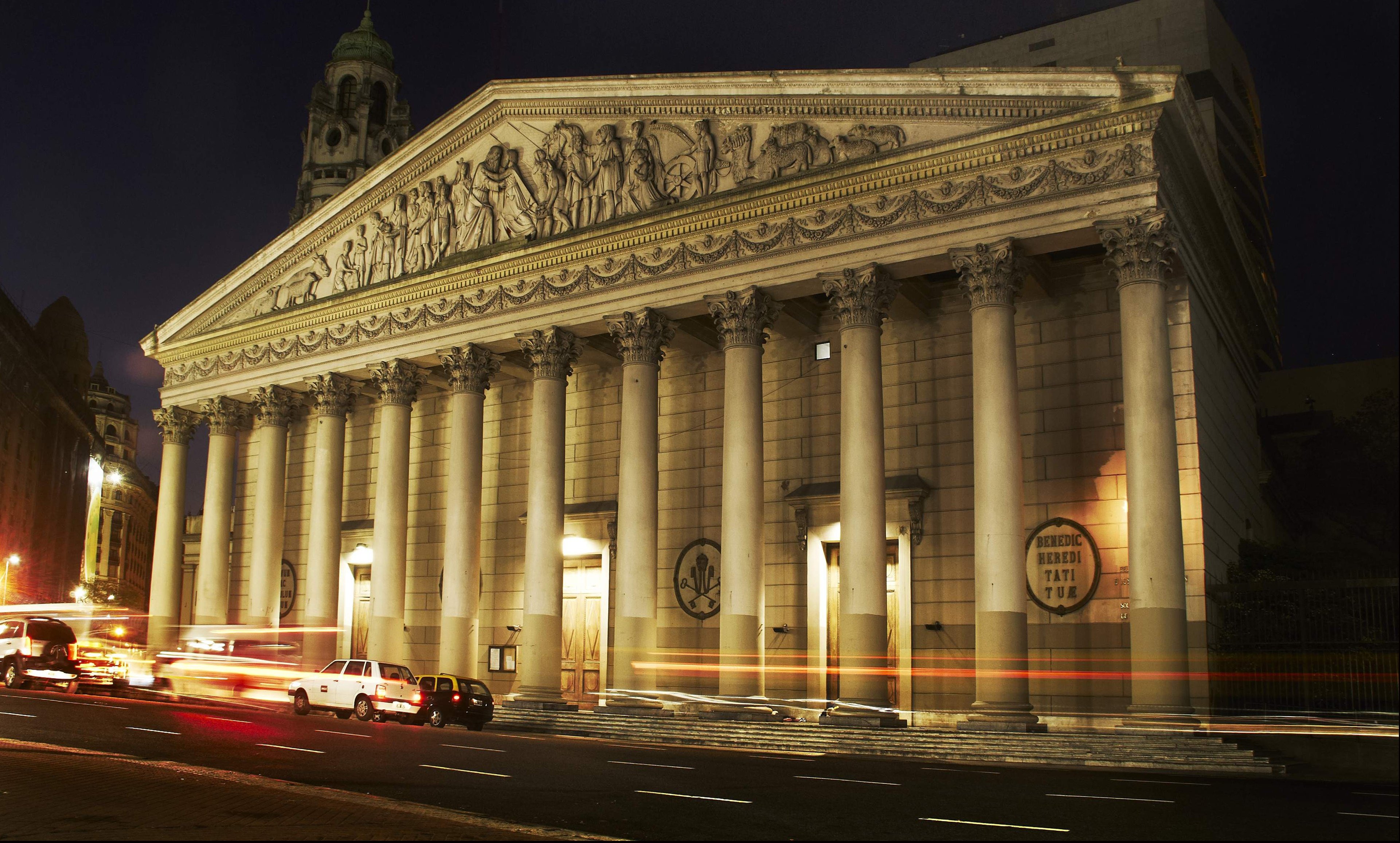 En este exterior nocturno se aprecia la Fachada frontal, de marcada reminiscencia greca